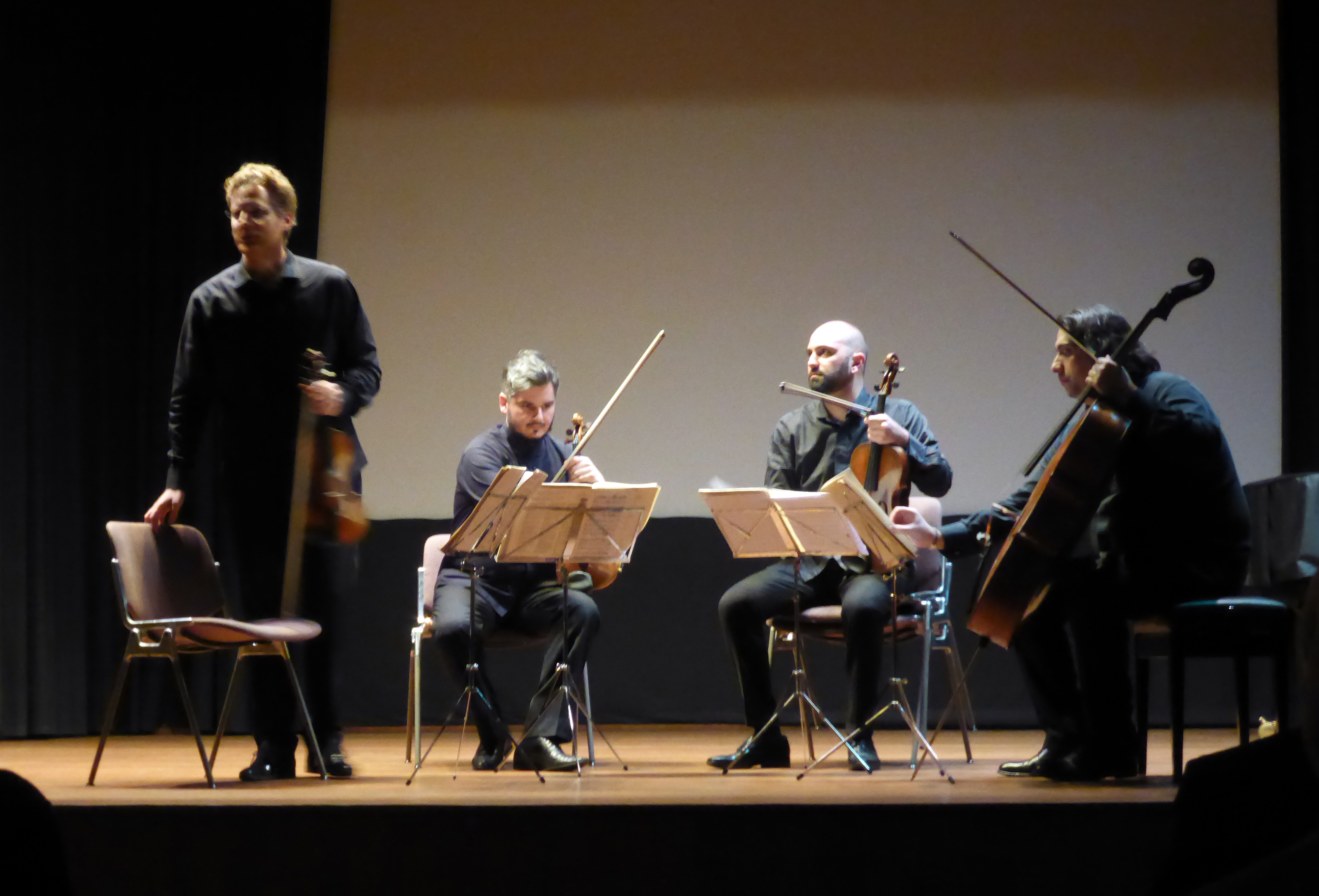 Das Quartetto di Cremona 2016 in Köln.